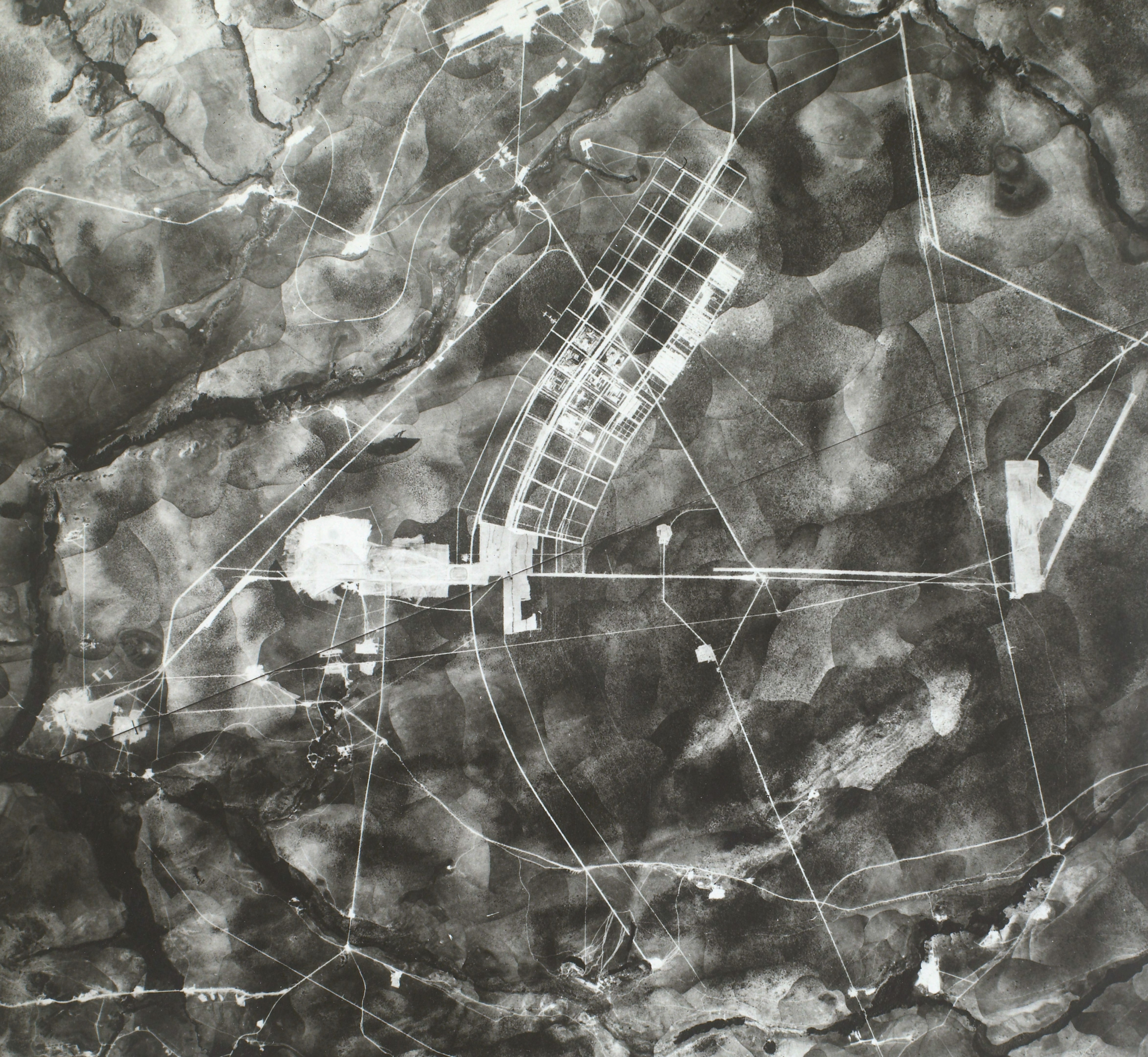 Fotografia do Fundo Correio da Manhã, sob a guarda do Arquivo Nacional.